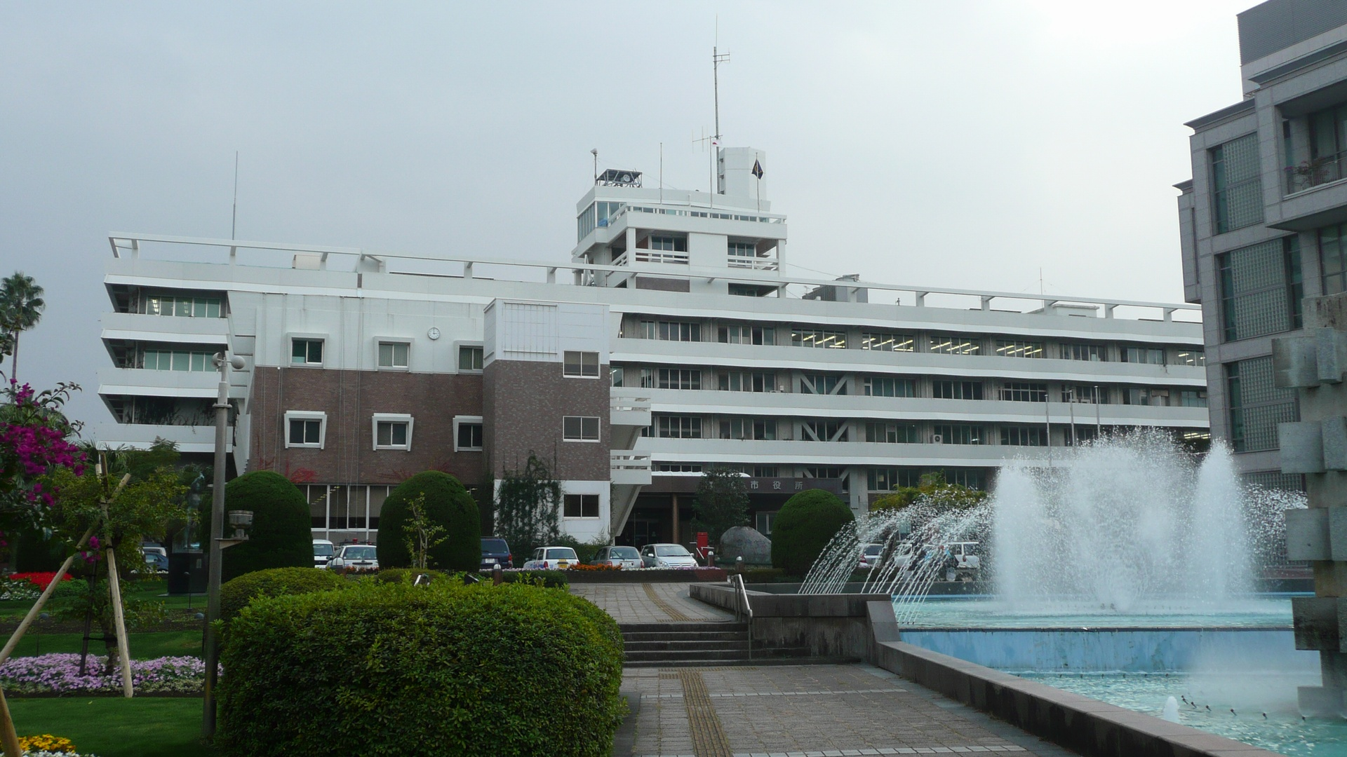 Mairie de la ville de Miyazaki (Japon).